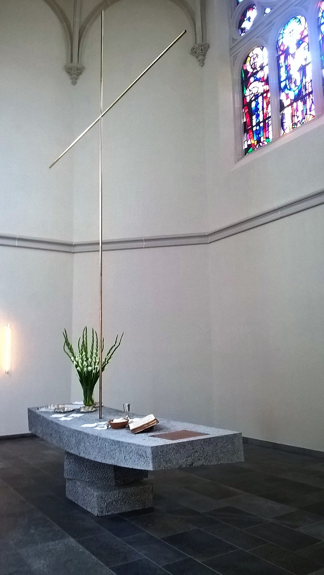 Evangelische Johanneskirche Gießen, Hessen, Deutschland